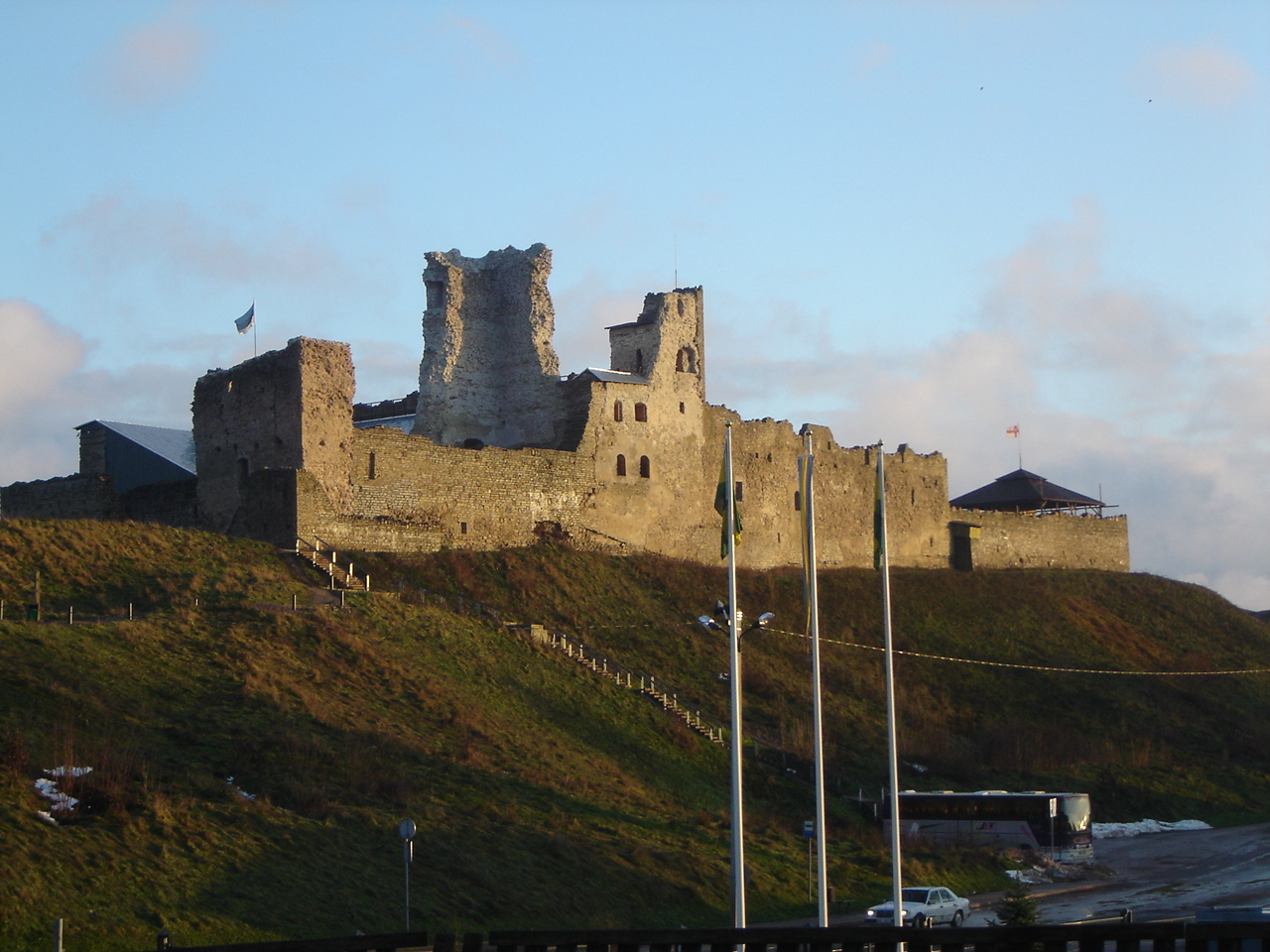 Linnuse lääne müür koos tornidega.